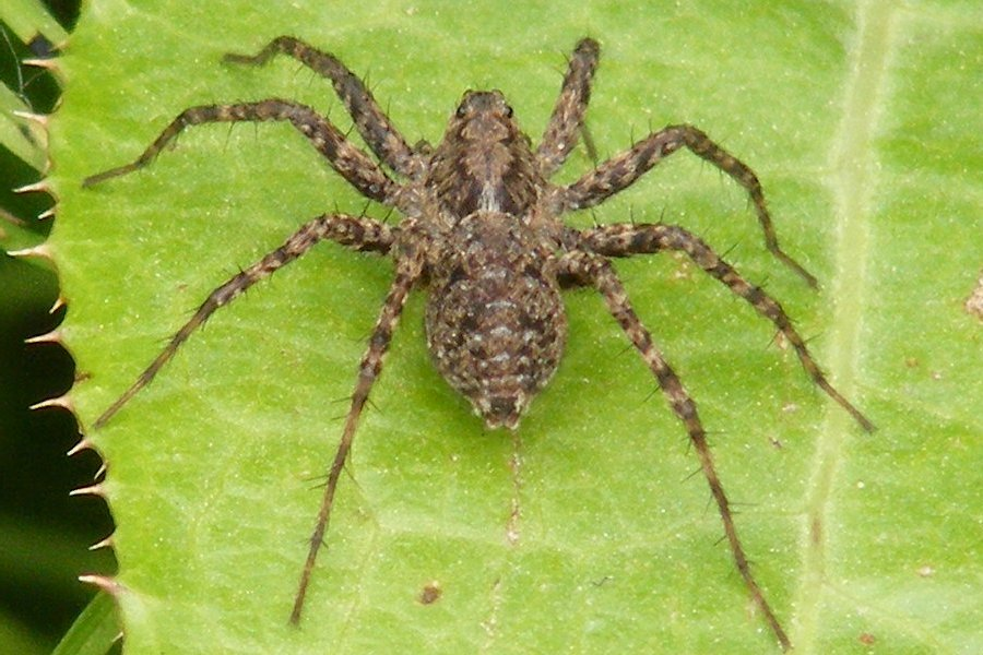 Pardosa milvina : Photographié dans la région montréalaise les 20 et 22 juin 2011, sur Fujifilm FinePix S700.